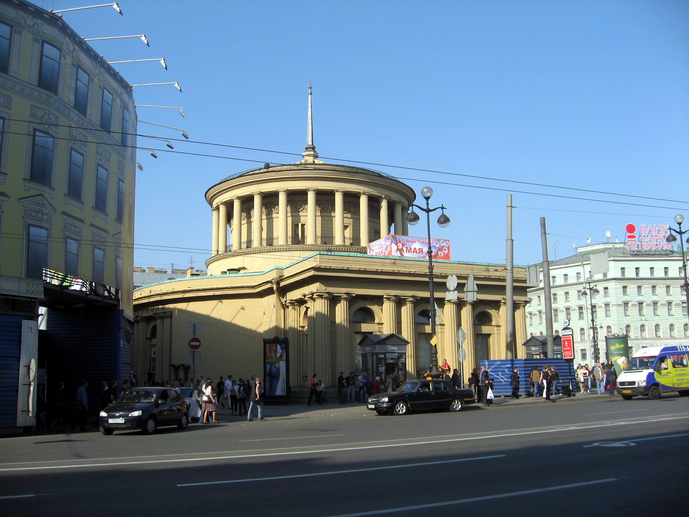 Sankt-Petěrburg (Petrohrad), stanice metra na konci Něvského prospektu